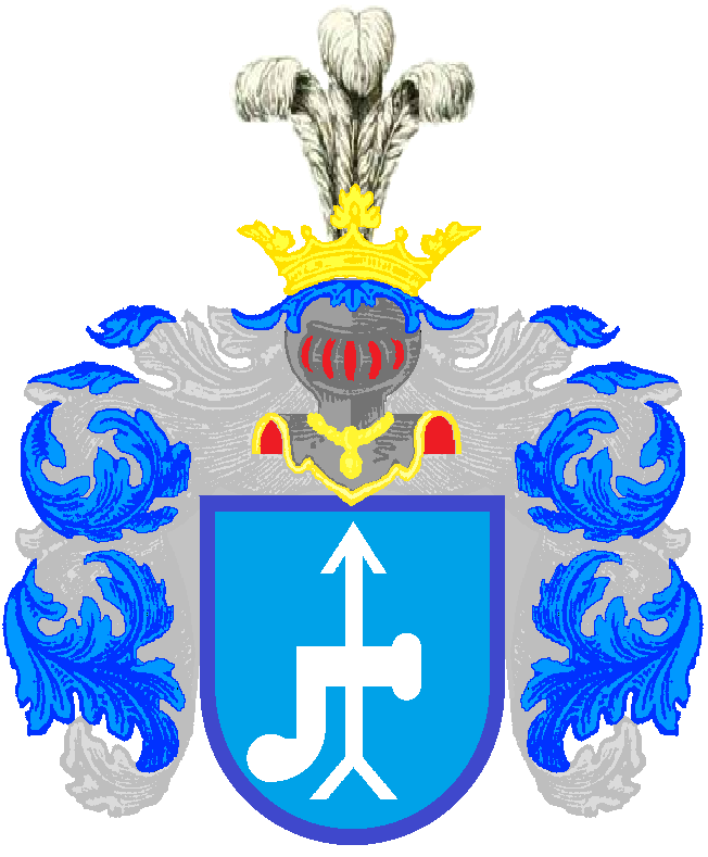 Герб Іполіта Федоровича Проскури